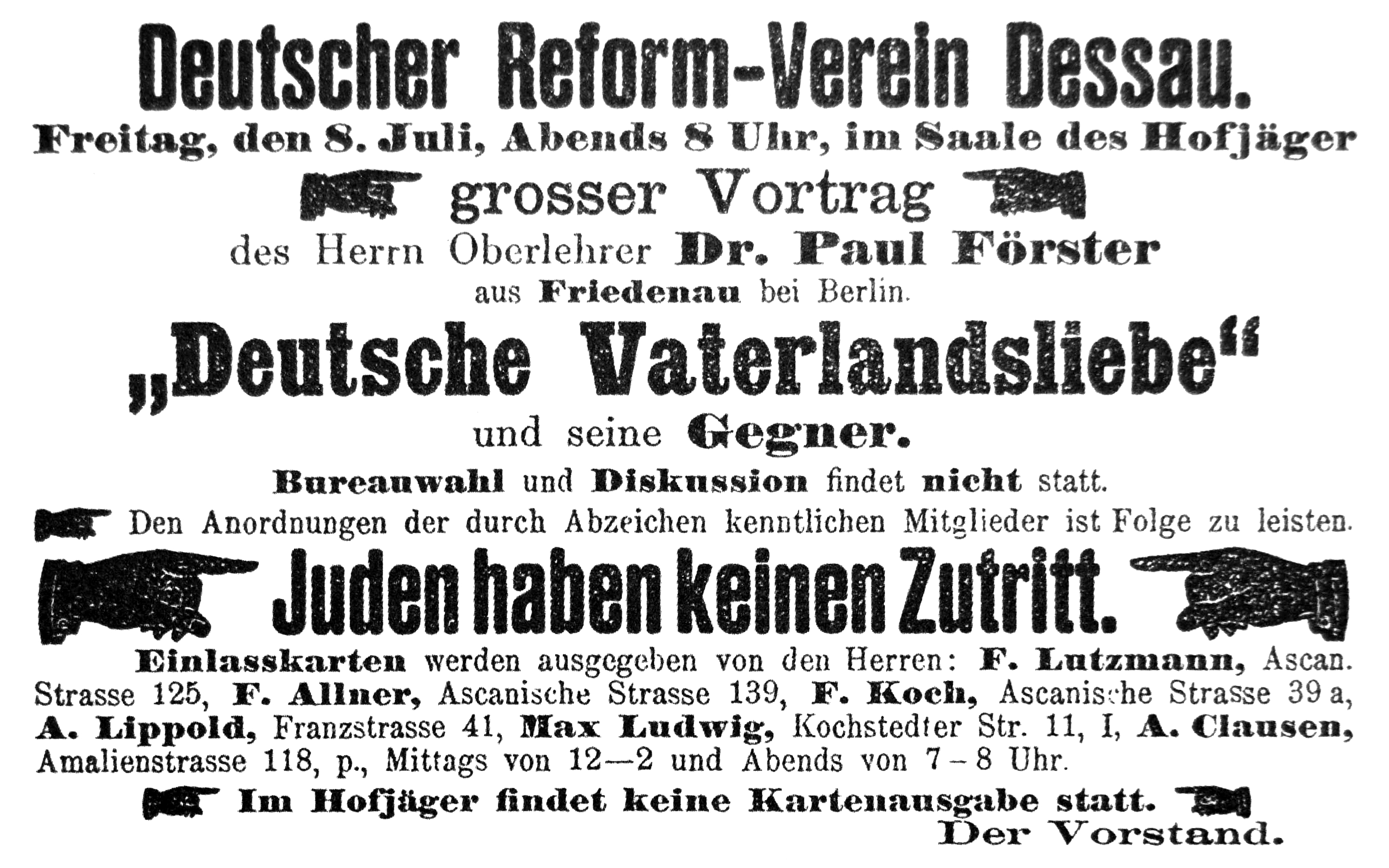 Vortrag von Paul Förster in Dessau, Anzeige des antisemitischen Deutschen Reformvereins (Ortsverein Dessau) im Anhaltischen Staatsanzeiger vom 7. Juli 1892. Der Automobilpionier Friedrich Lutzmann wird namentlich erwähnt.